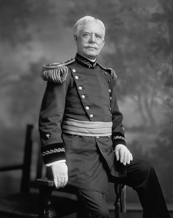 General Henry H. C. Dunwoody